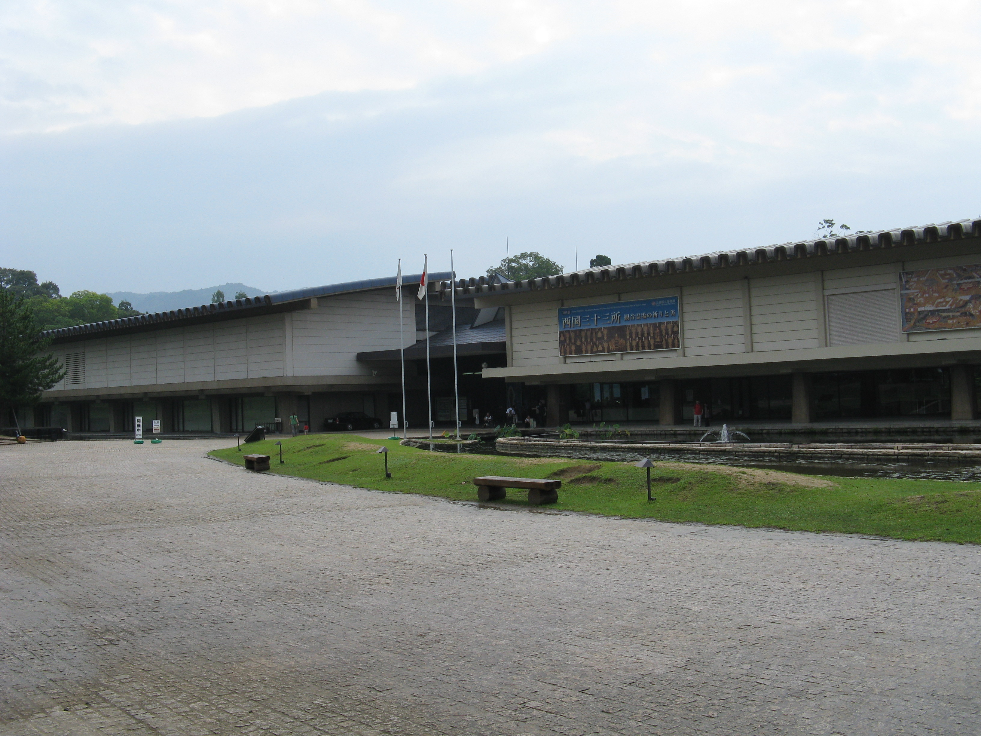 奈良国立博物館 新館